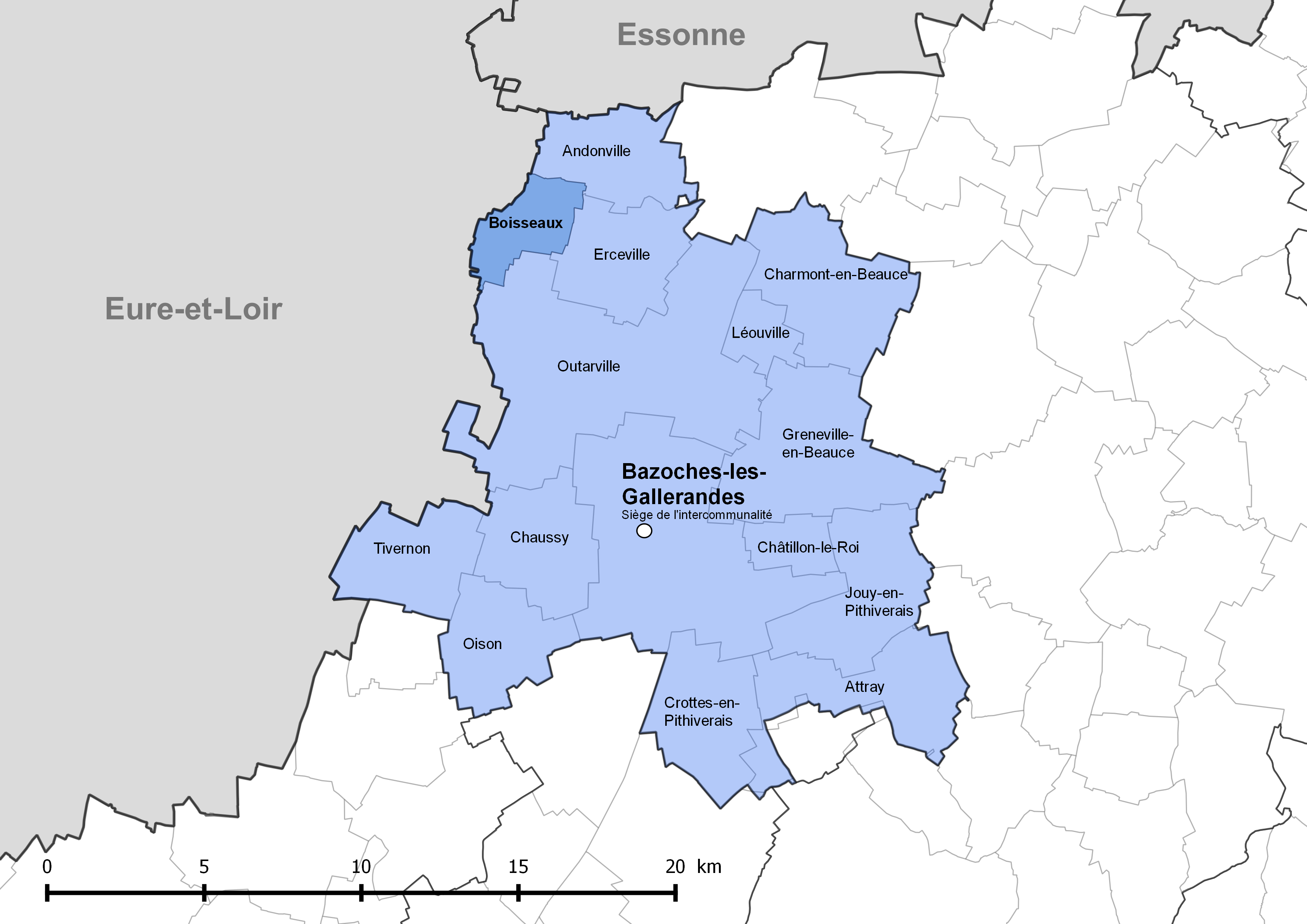 Périmètre de la communauté de communes de la Plaine du Nord Loiret - Situation de la commune de Boisseaux.